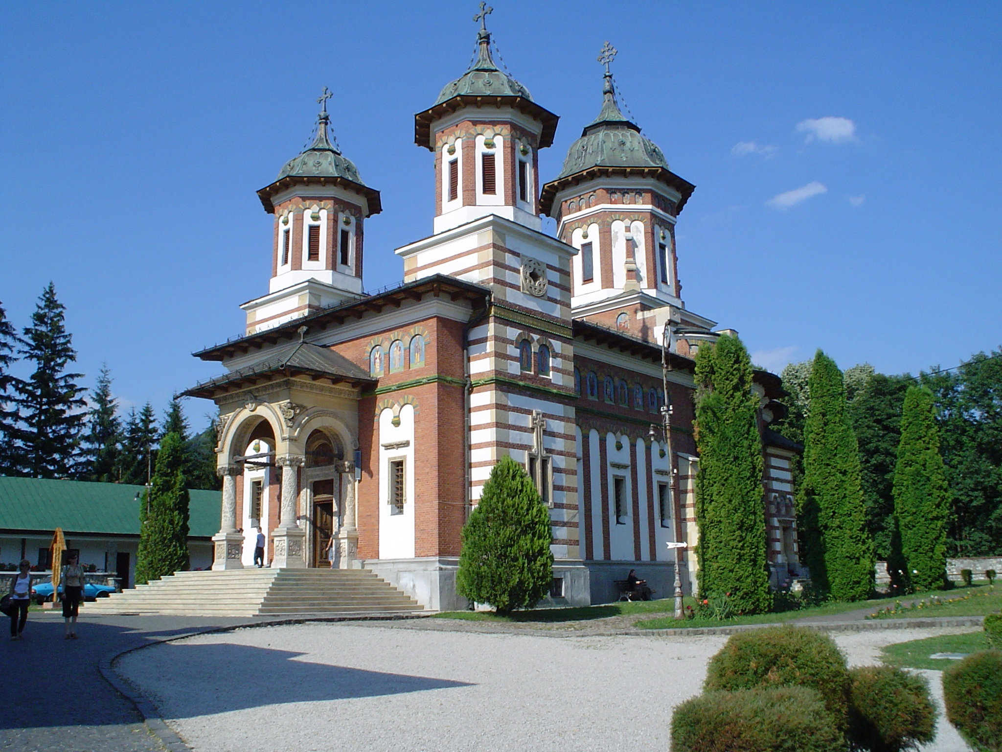 2007-07-10 Sinaia, Romania: Sinaia Monastery.